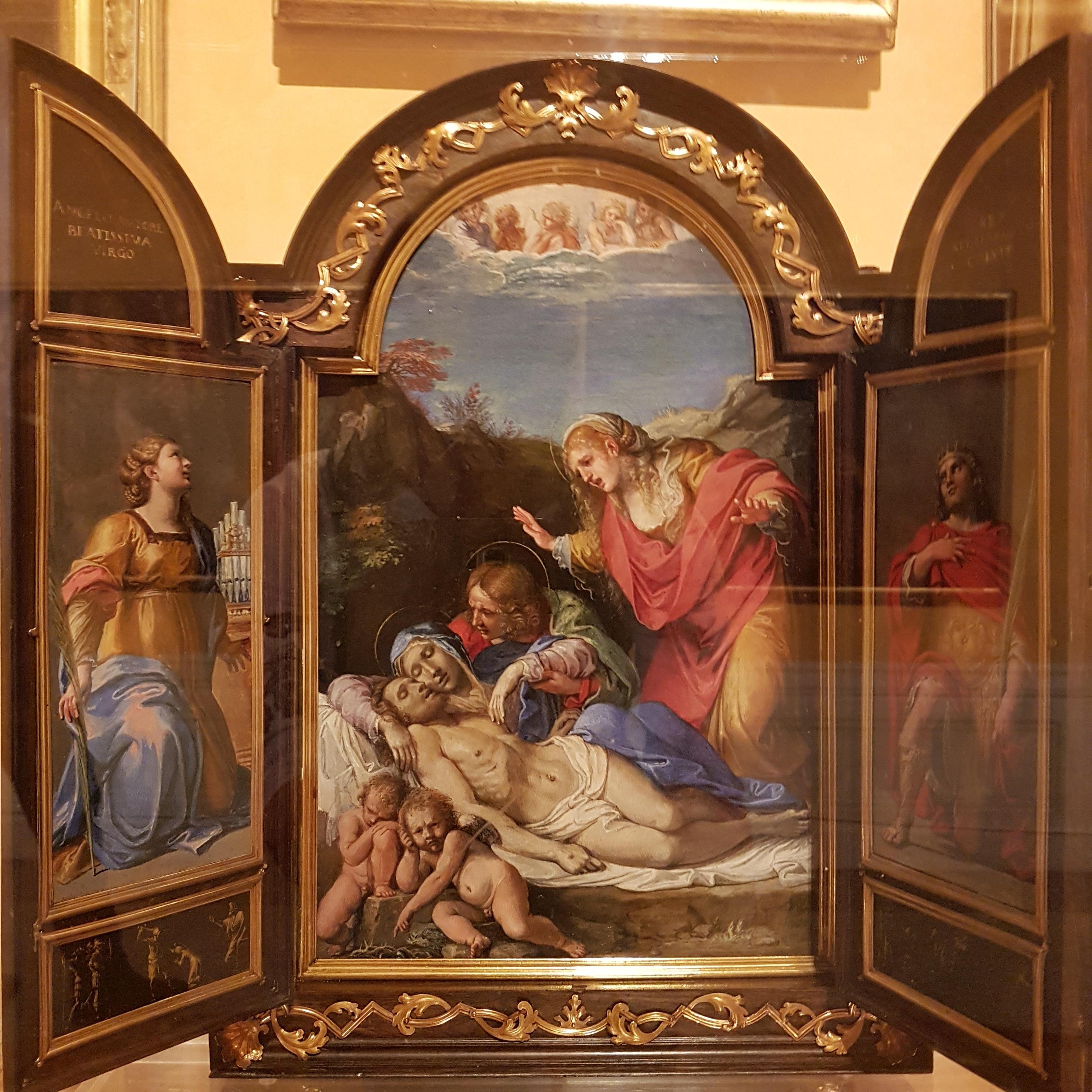 Palazzo Barberini (Rome), Annibale Caracci, Hausaltar mit Beweinung Christi